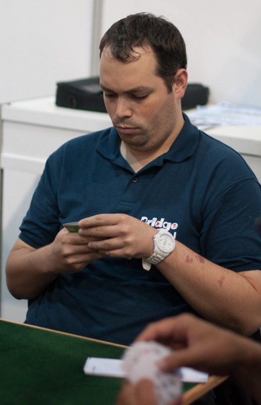 Ron Schwartz Israel